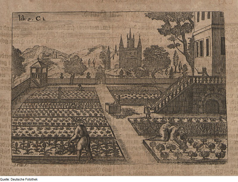 Original image description from the Deutsche Fotothek Landwirtschaft & Pflanzenbau & Gemüsebau